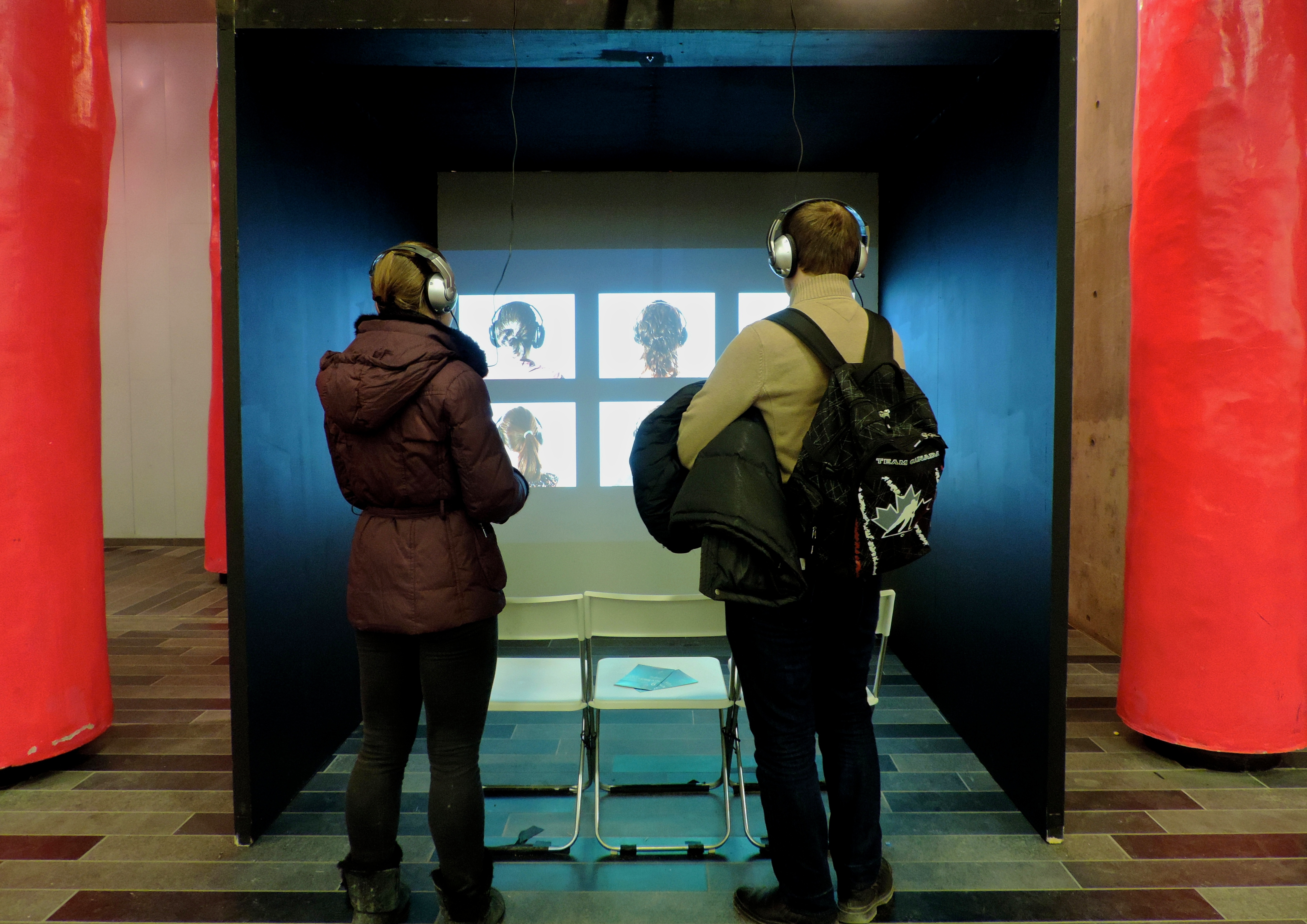 Installation vidéo Zone : Palais des congrès de Montréal Dans la vidéo Fenêtres d'écoute, six personnes décrivent des ambiances à partir d'archives sonores de lieux publics. Avec ces repères le spectateur se fait une image de l'espace. Mais cette image est fugitive et furtive, elle se construit au fil des récits qui se déploient, se superposent ou se contredisent parfois. Claudette Lemay s'intéresse aux écarts entre ces récits, à l'interprétation et l'invention inhérente à toute activité de traduction. Performance: Georges Audet, Jérôme Bouchard, Rosalie D. Gagné, Natalie Lafortune, Guylaine Séguin, Camila Vasquez